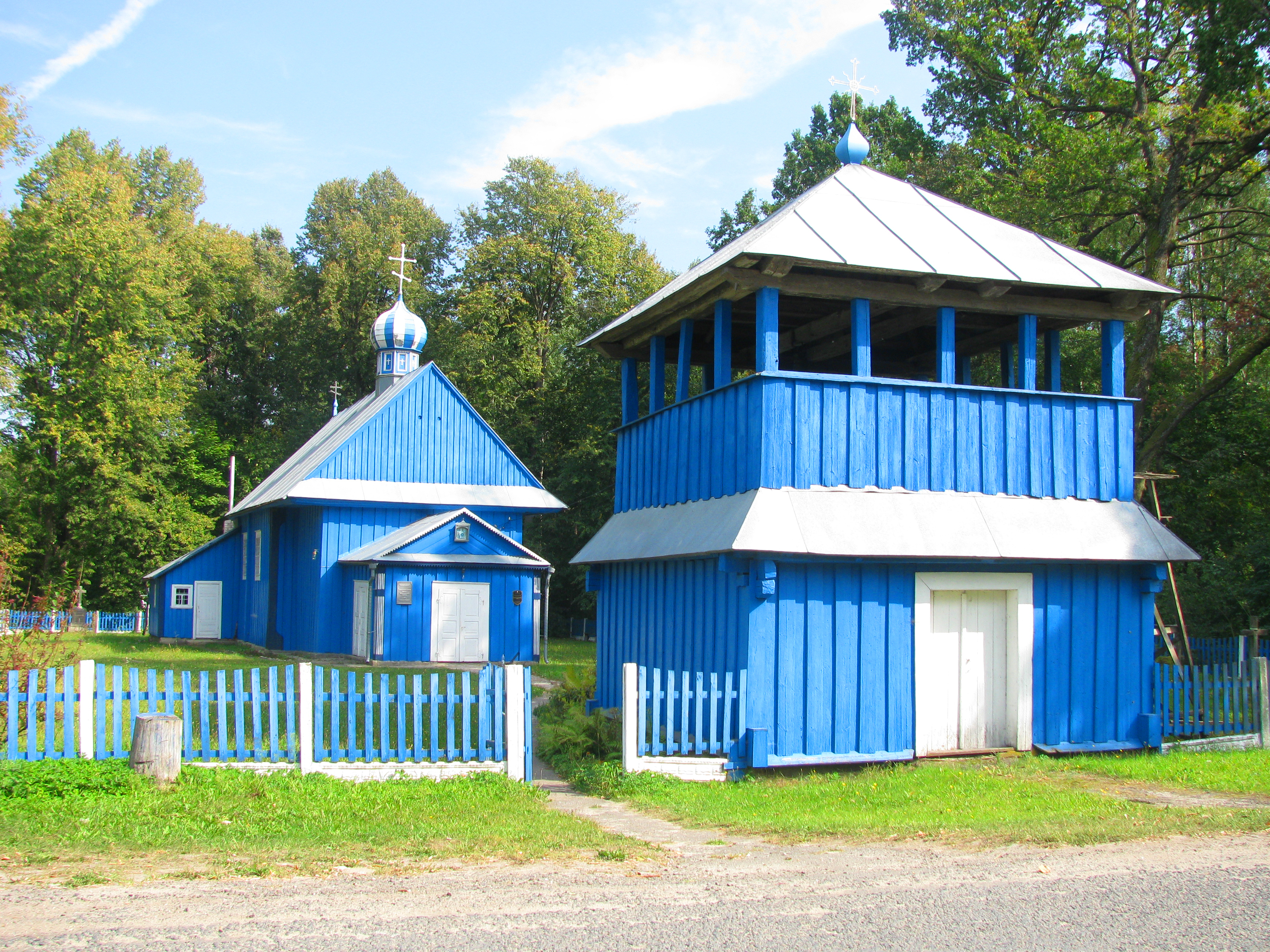 Беларуская (тарашкевіца): Сьвята-Мікалаеўская царква. в. Чарнякава This is a photo of Belarusian heritage monument. Reference number: 113Г000157 ( WLM)